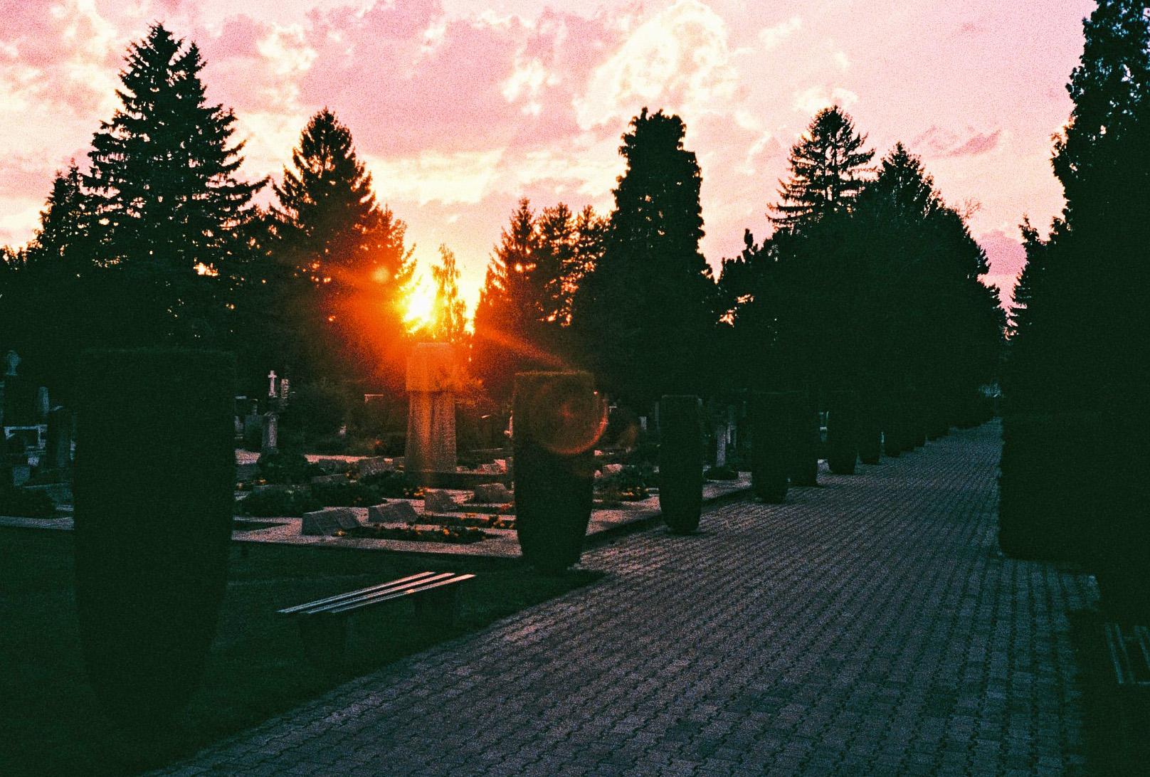 Sunset over Žale